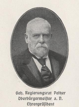 Ludwig Peltzer (1835-1915), Oberbürgermeister von Aachen, Deutscher Reichstags- und Preussischer Landtagsabgeordneter (Zentrum)